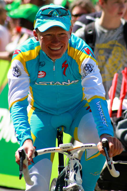 Alexandre Vinokourov en la última etapa del Tour de Romandía 2011